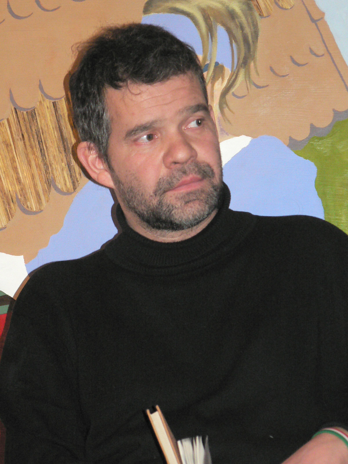 Zsuffa Péter 2006-ban, a háttérben Luchesi-Fekete Eszter egy festményének részletével